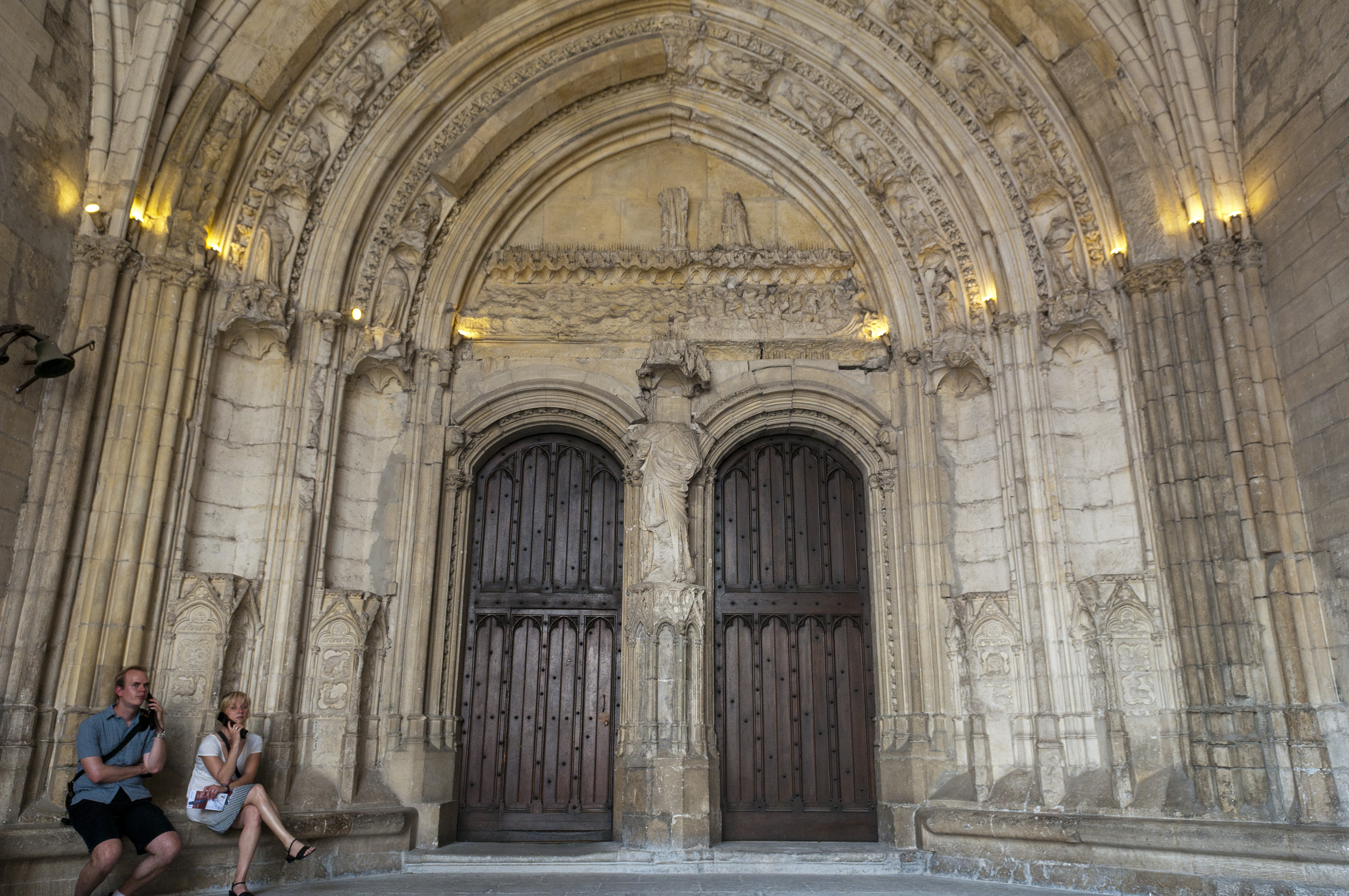 Palais des Papes, Avignon, Provence, France